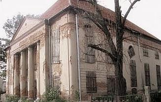 Synagoga w Kępnie